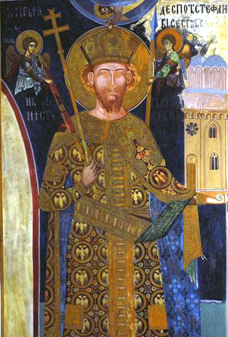 le Desposte Stefan Lazarevic